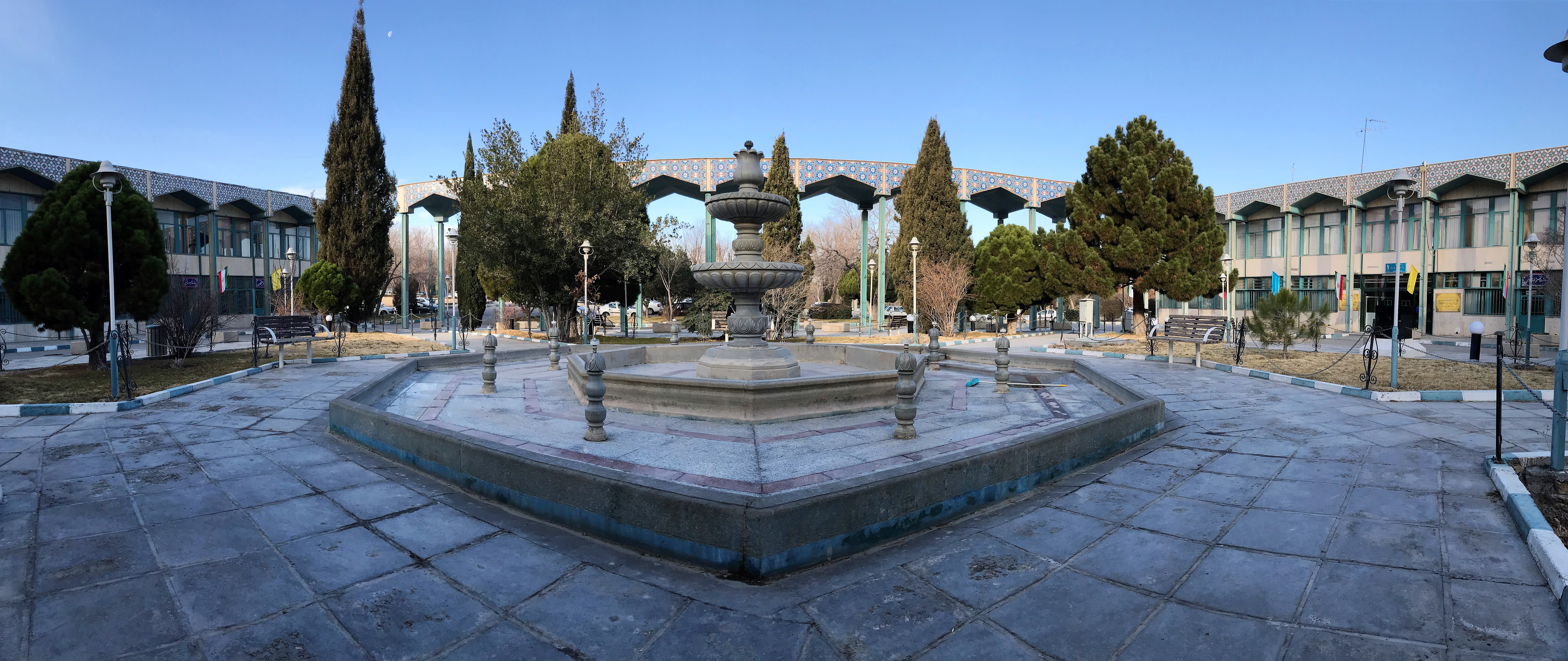 محوطه دانشکده پزشکی اصفهان